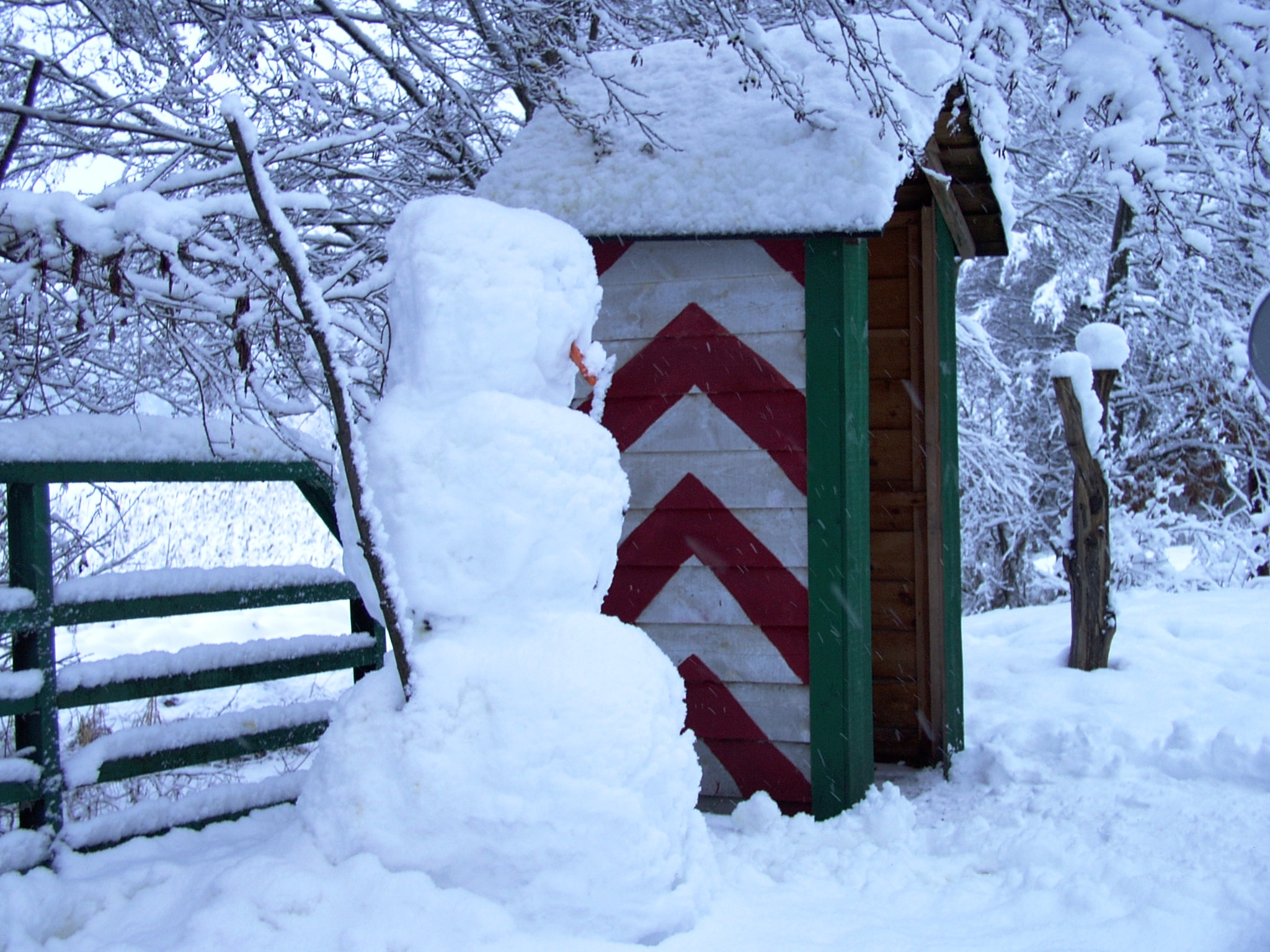 Granica jedności w Łajsie, okolice Olsztyna